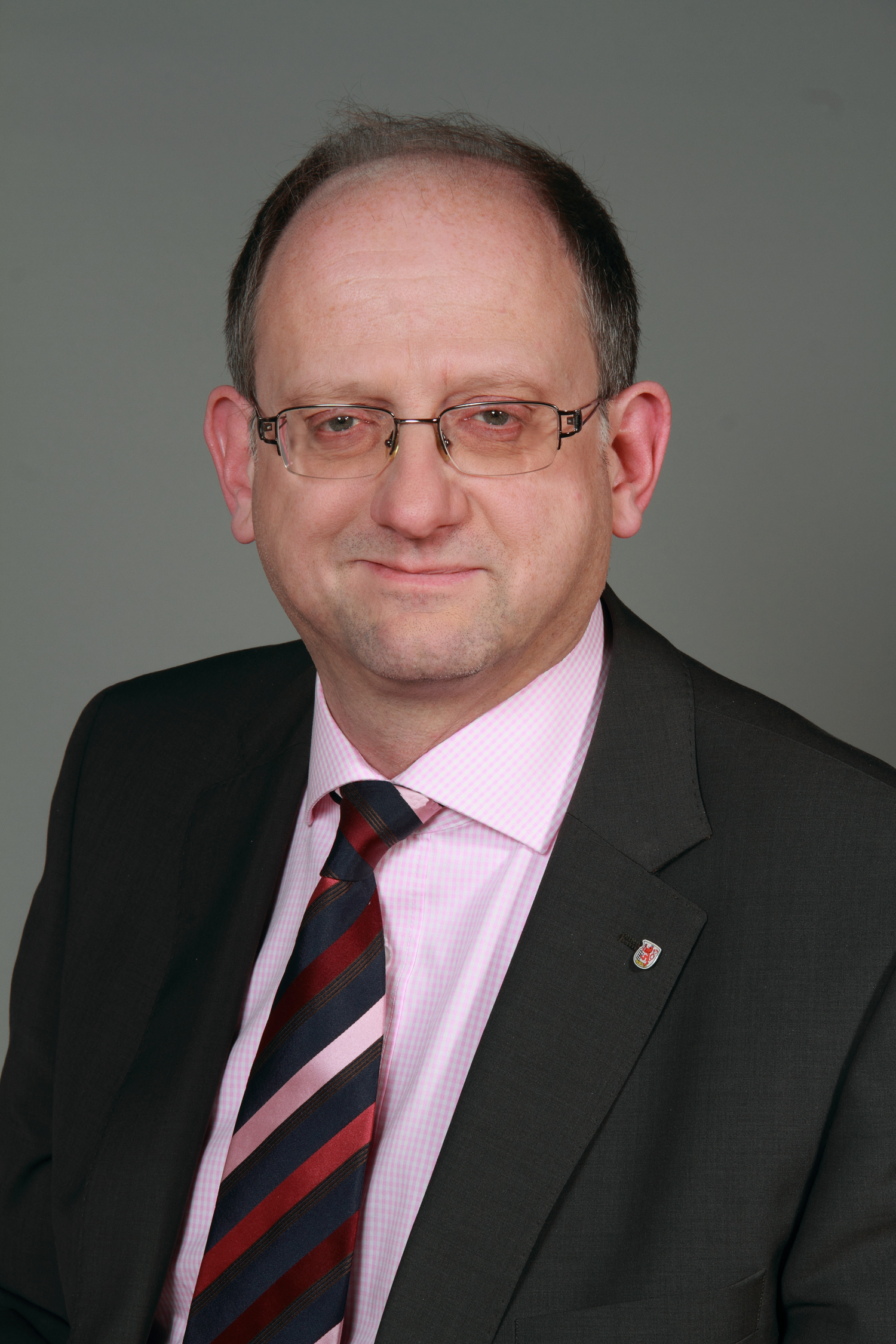 LandtagsabgeordneteR NRW